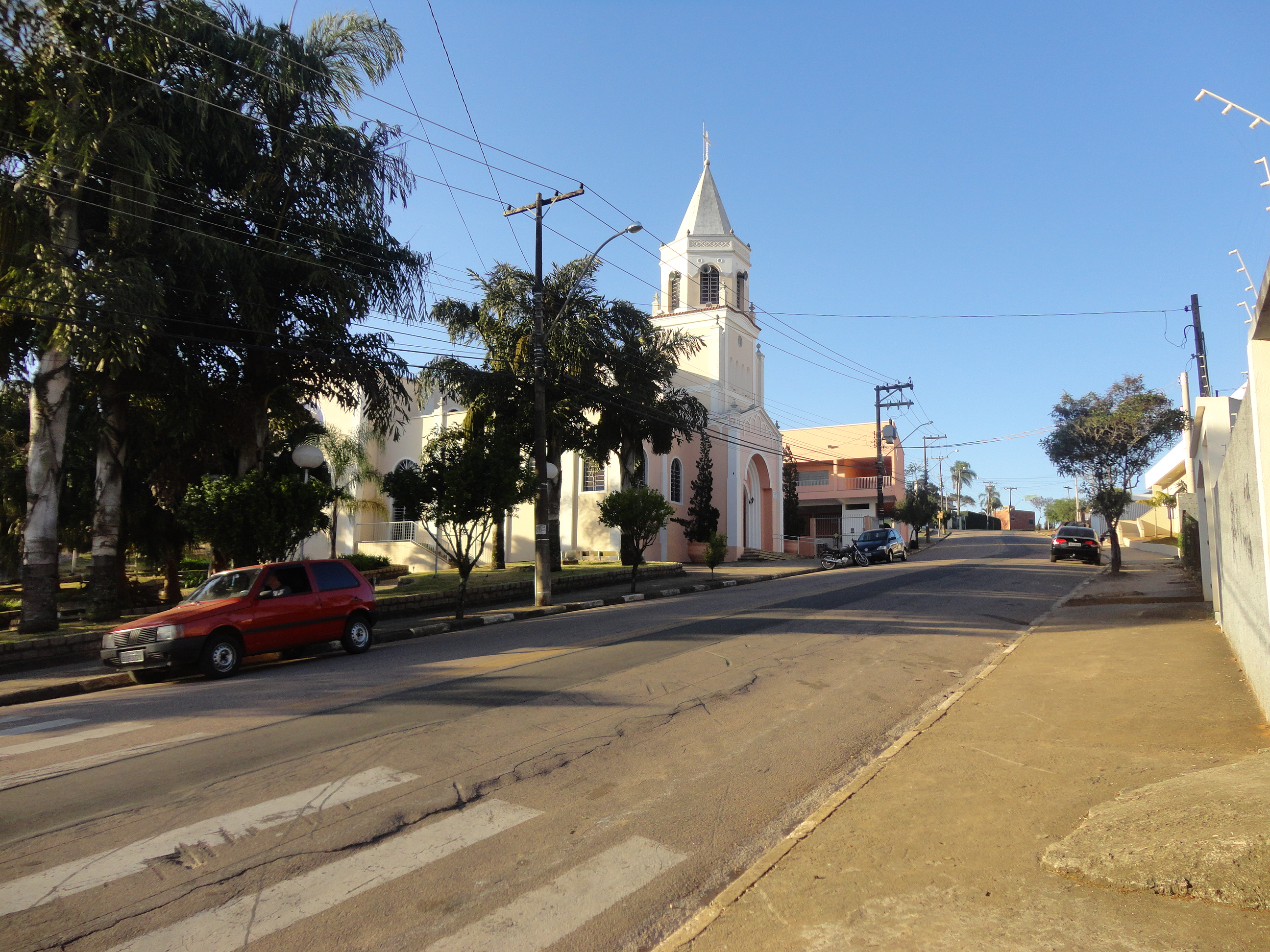 Igreja de Santo Antônio em Itatiba, visão da Rua Sto Antônio. Data 12/07/2013